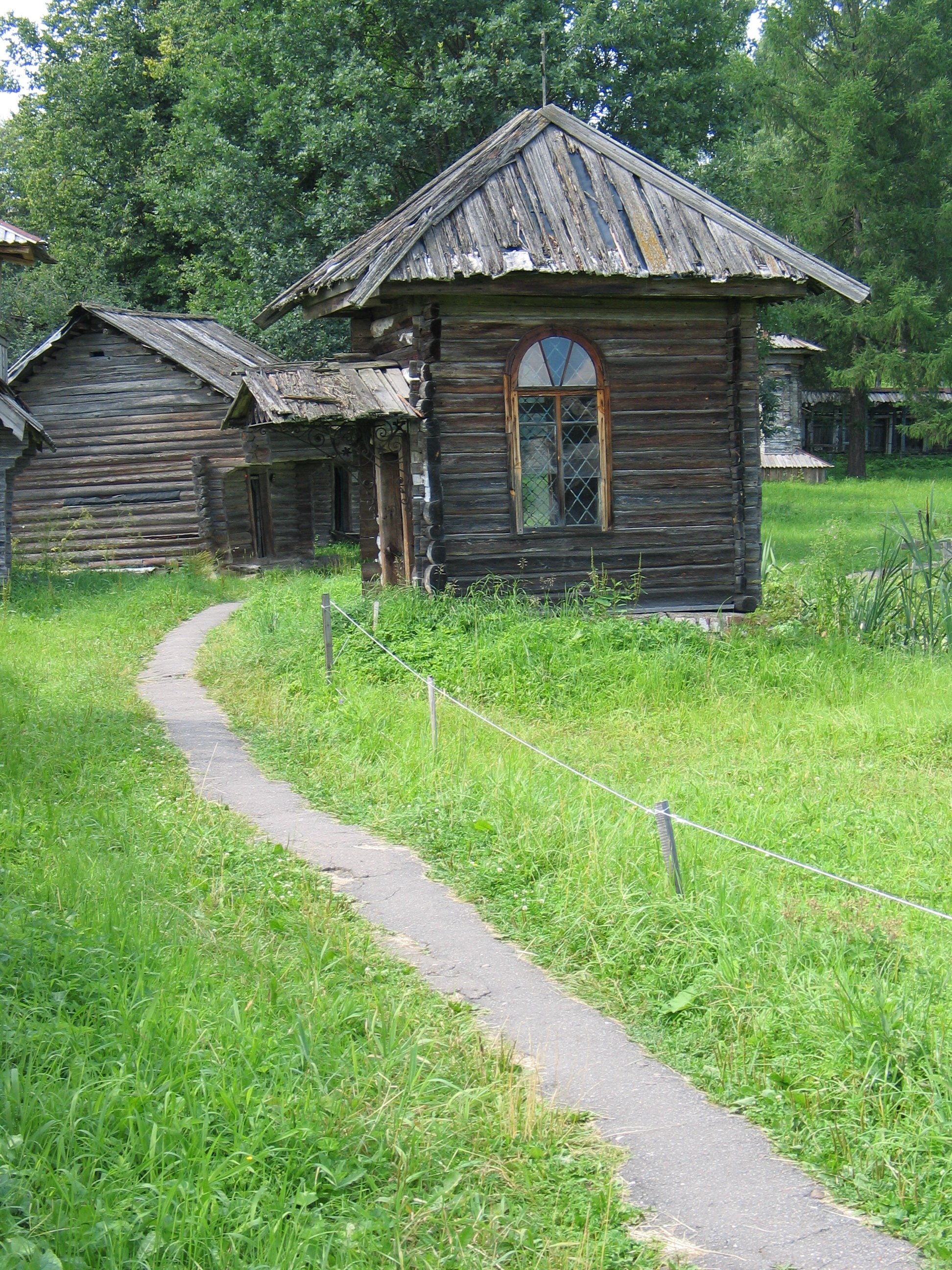 Этнографический музей под открытым небом в Мышкине, постройки 18-19 века